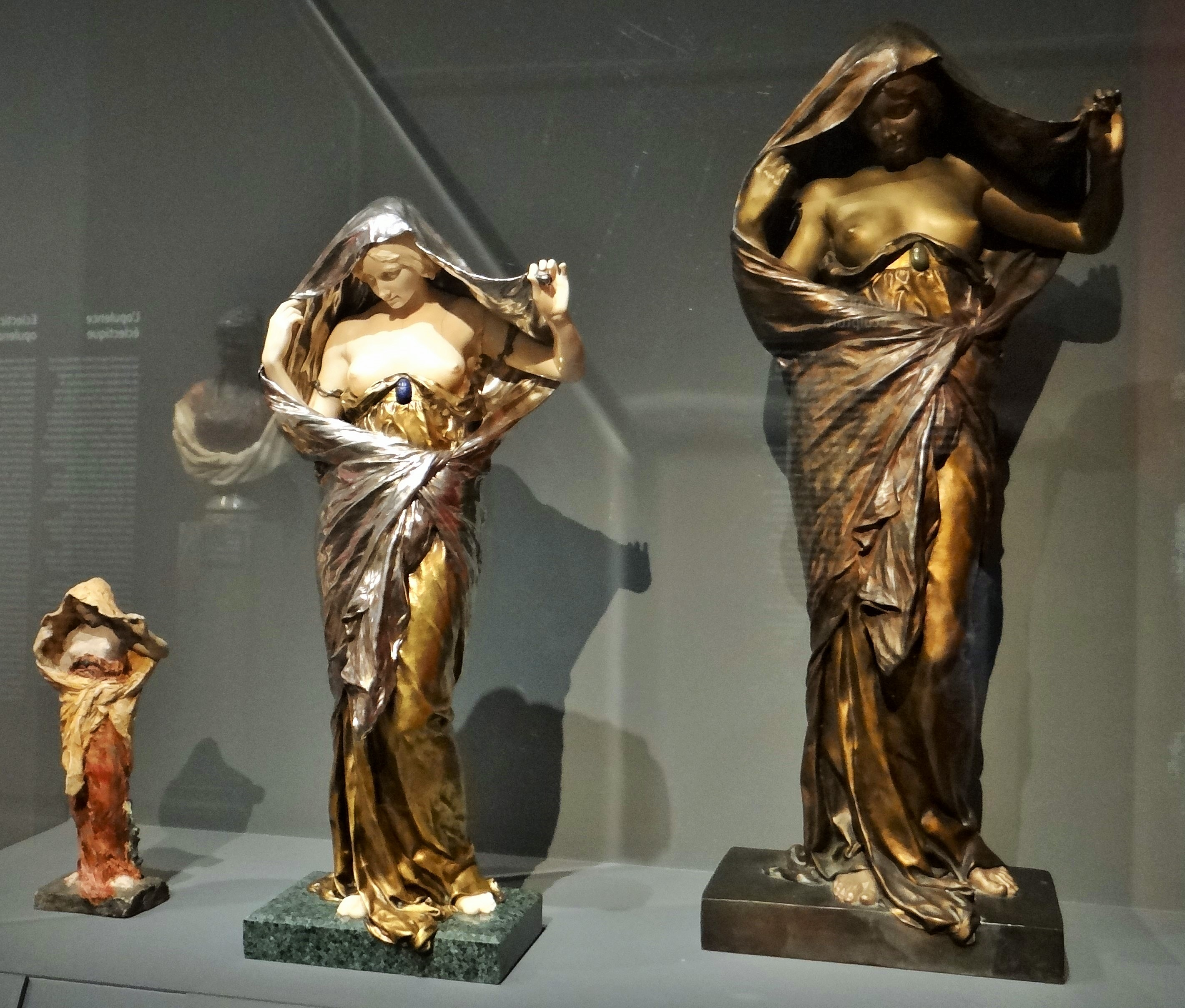 La Nature se dévoilant à la Science, Louis Ernet Barrais, plâtre peint, 1884-1899, Musée Carnavalet La Nature se dévoilant à la Science, 1903, Ivoire, bronze doré et argenté, lapis-lazuli et marbre, Musée des Arts Décoratifs, Paris La Nature se dévoilant à la Science, vers 1899, broze doré et jaspe (?), Louis Ernet Barrias, Paris Musée d'Orsay